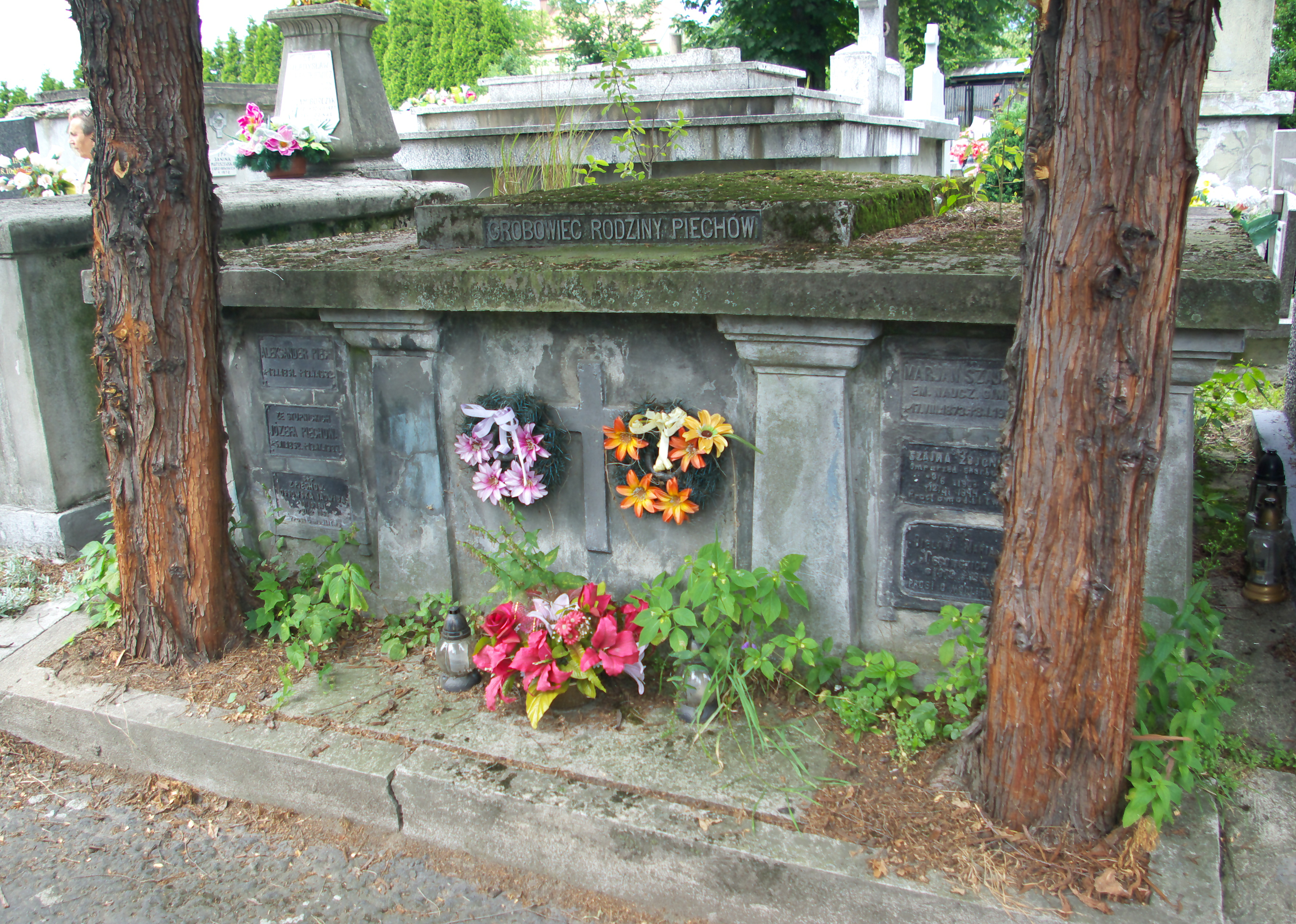 Grobowiec rodzin Piech i Szajna na Cmentarzu Centralnym w Sanoku.